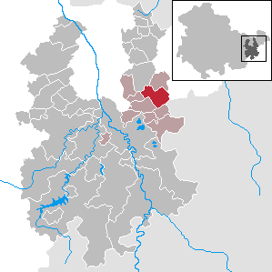 Rückersdorf in Thuringia - District Greiz